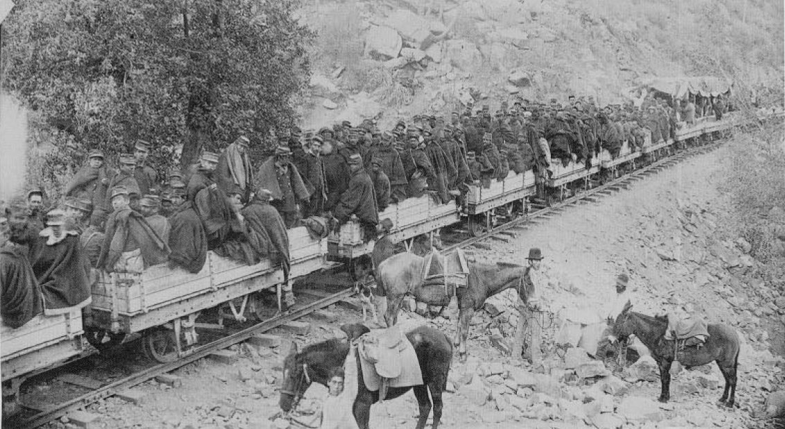 Chile. La División "Camus" del ejército en Los Loros (Los Andes), 1891.